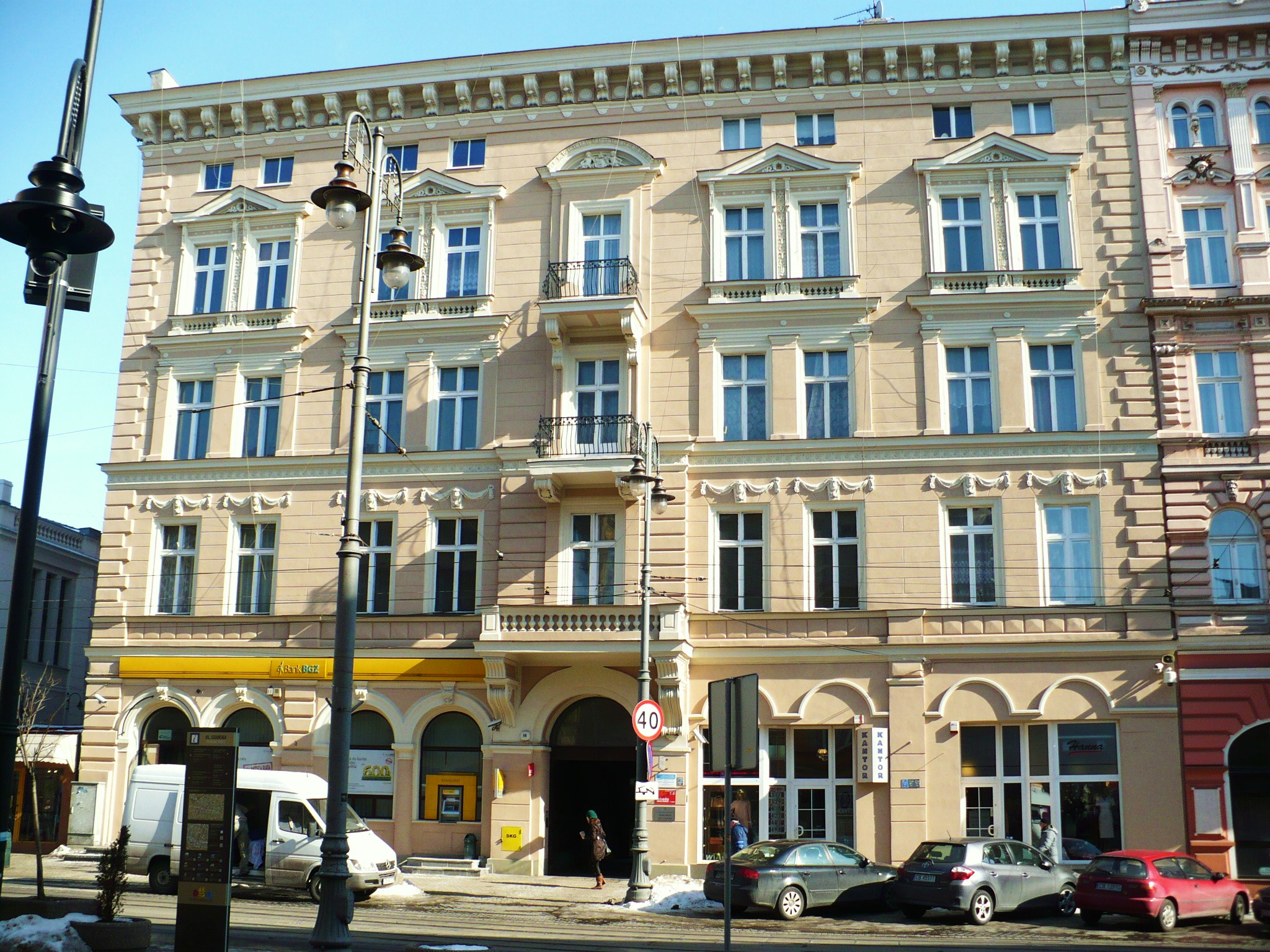 Kamienica w stylu eklektycznym